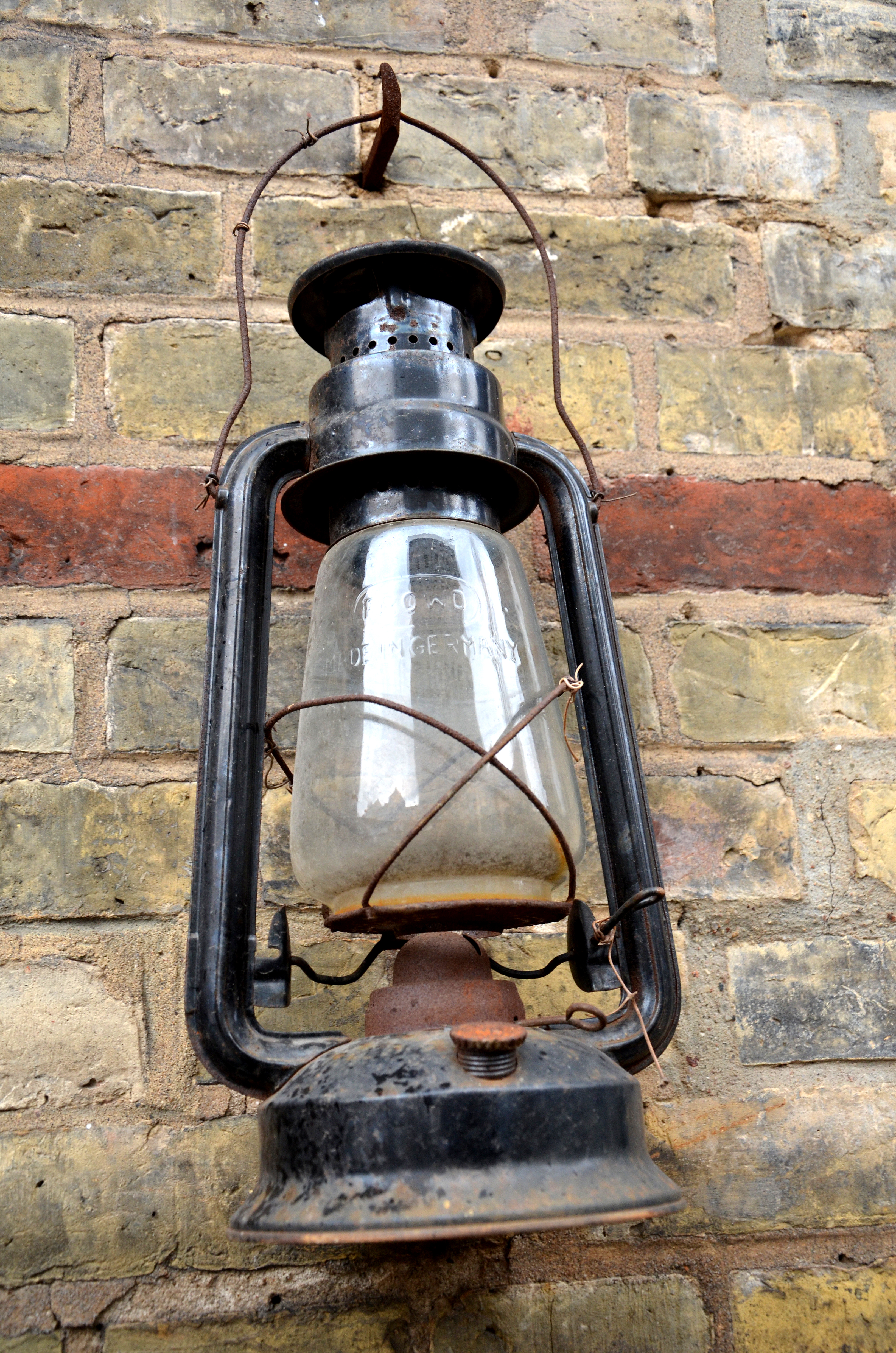 Diese langsam vor sich hin rostende Frischluftlampe der Marke Fröhlich & Wolter (FROWO) fand sich an der Aussenwand eines alten Hinterhof-Betriebsgebäudes, heute am Ende des Innenhofes hinter dem Gebäude der Wikimedia Deutschland am Tempelhofer Ufer 23/24 in Berlin. Die Petroleumlampe zeigt auf dem Glaskörper die Marke FROWO und den Hinweis „Made in Germany“ während der Ölfuß präzisiert „Made in [:de:Deutsche Demokratische Republik“ – German Dem. Rep. Bei den hier gezeigten vier Bildern fehlt noch ein Foto mit der genauen Modell-Nummer ...